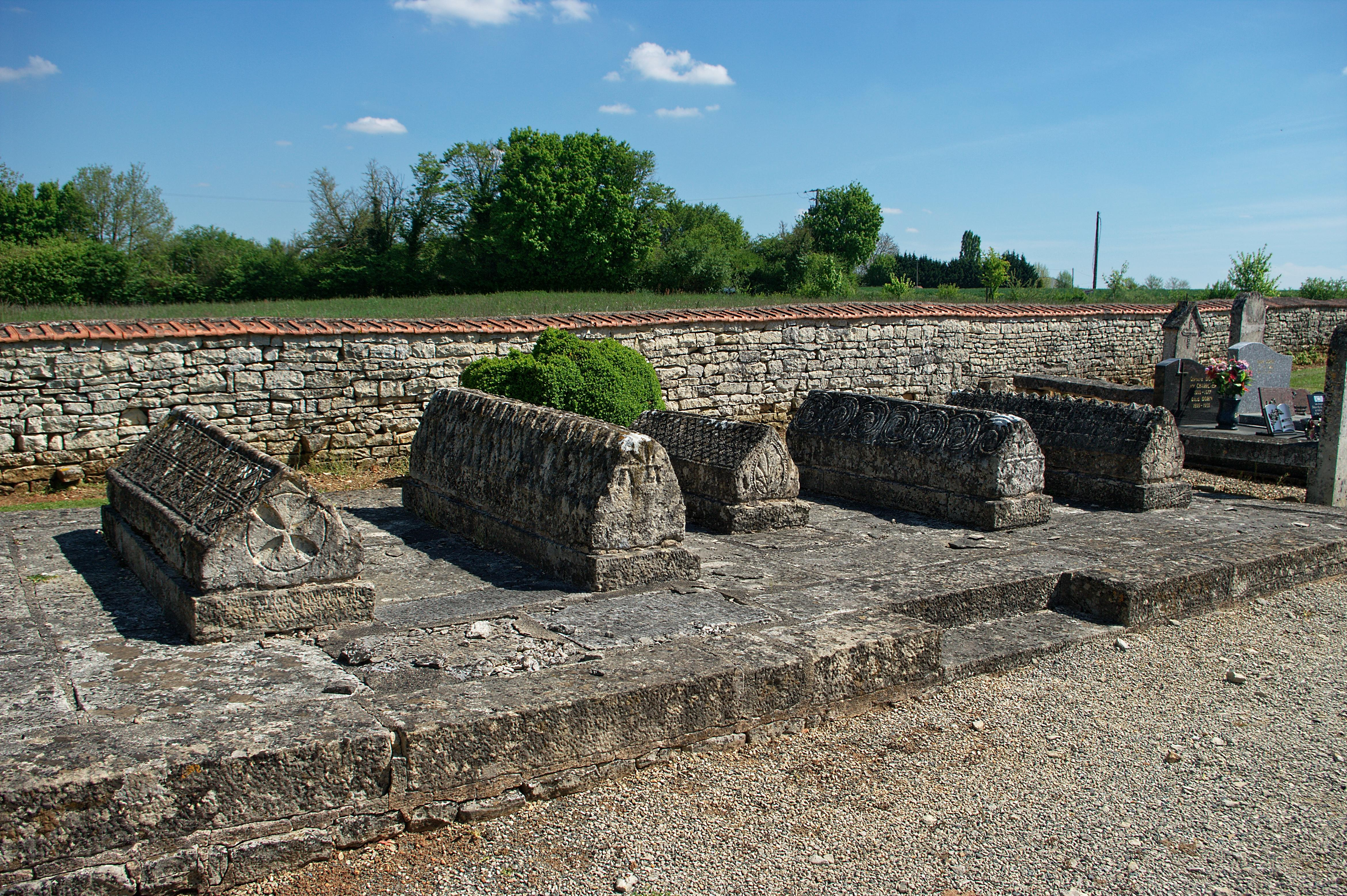 Cimetière de Pers (ClasséClassé)